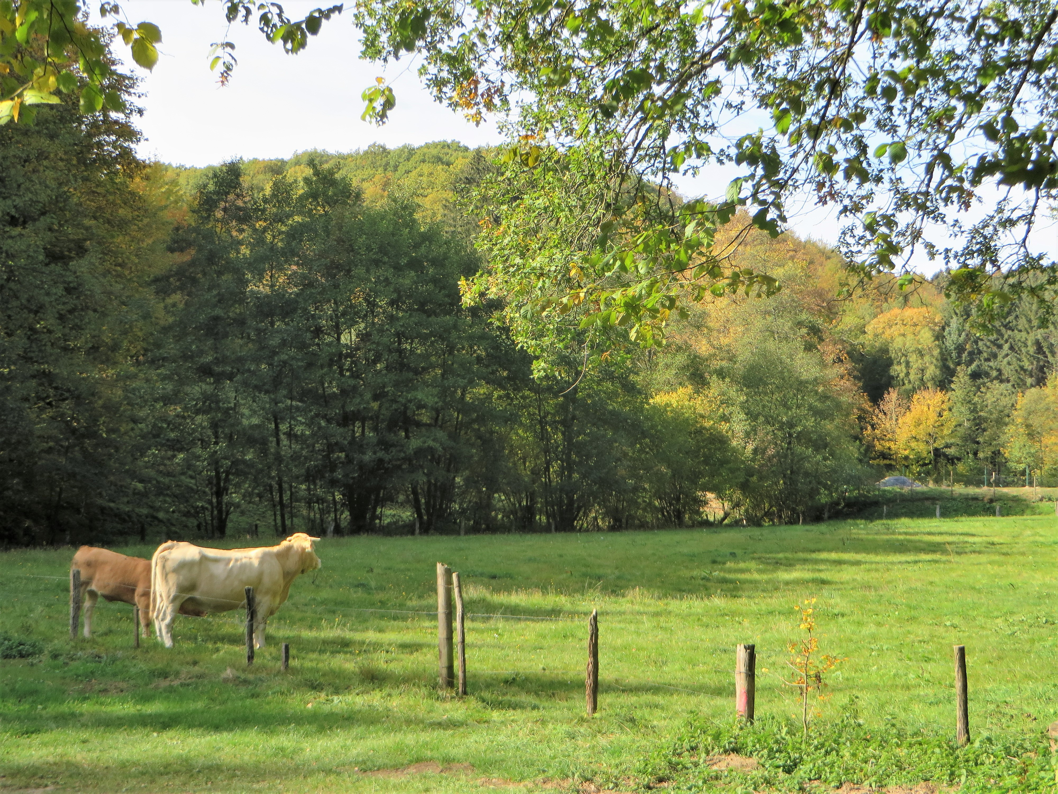 Naturschutzgebiet (OE-034) „Eckenbach-Quellbäche“ in Attendorn, Nähe Gutsweg Richtung Gut Dahlhausen. Blick auf das Schutzgebiet um den Eckenbach hinter der Weide.